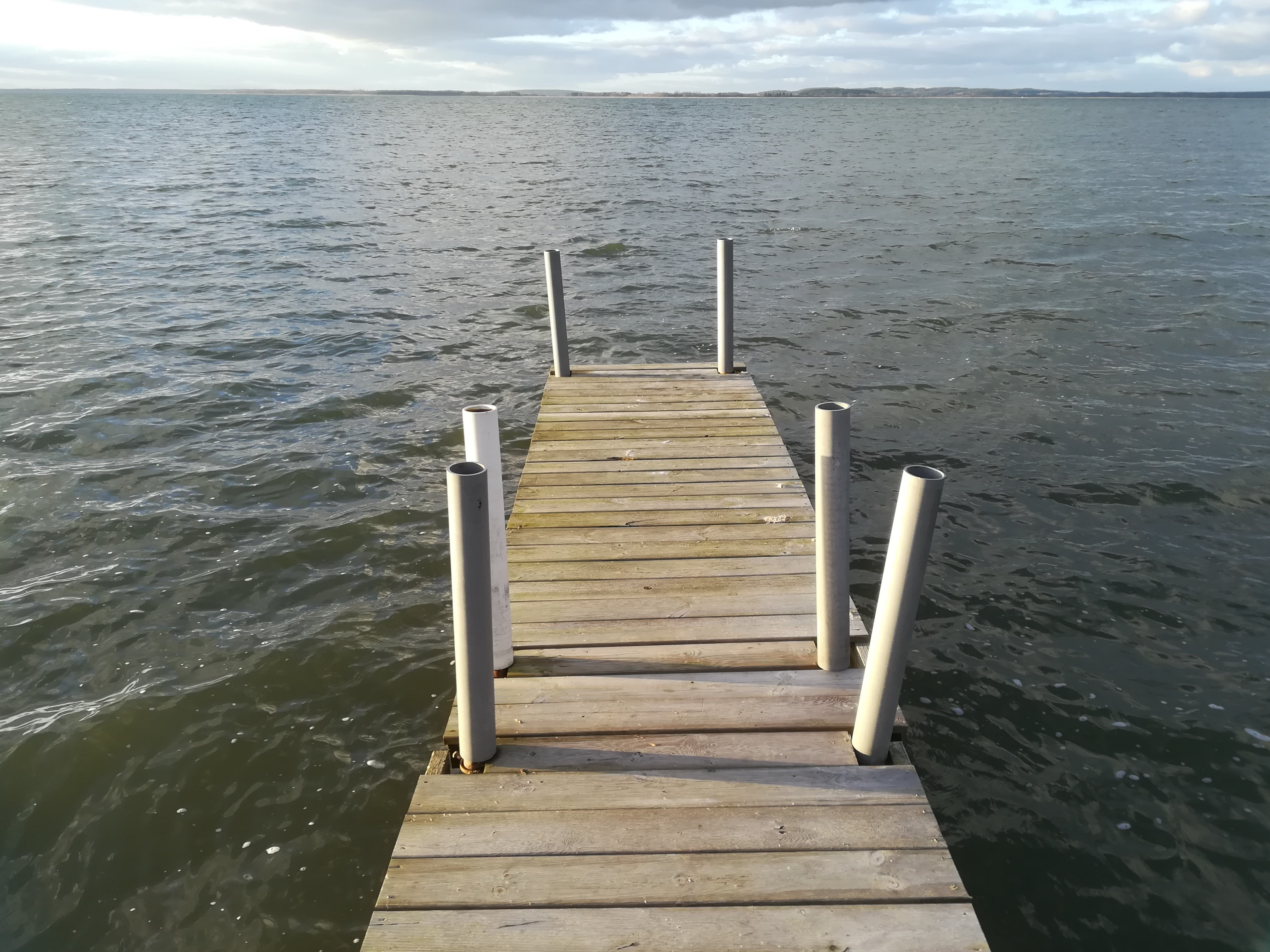 Jezioro Śniardwy z Nowych Gut.